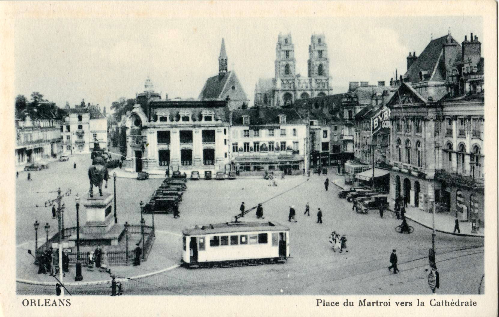 Carte postale ancienne, sans mention d'éditeur : ORLEANS - Place du Martroi vers la Cathédrale